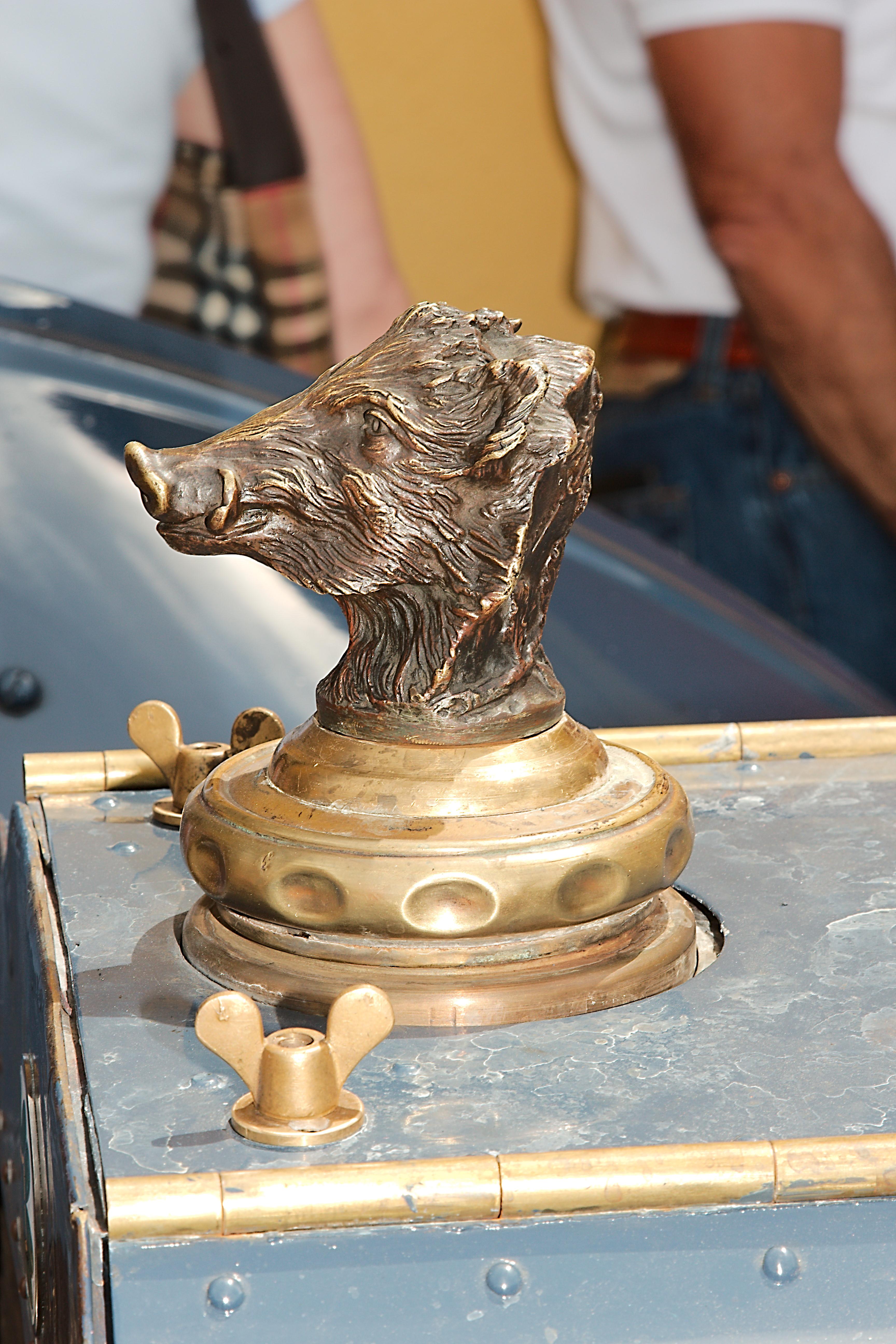 Brasier 1908 9500ccm Gaisbergrennen 2012